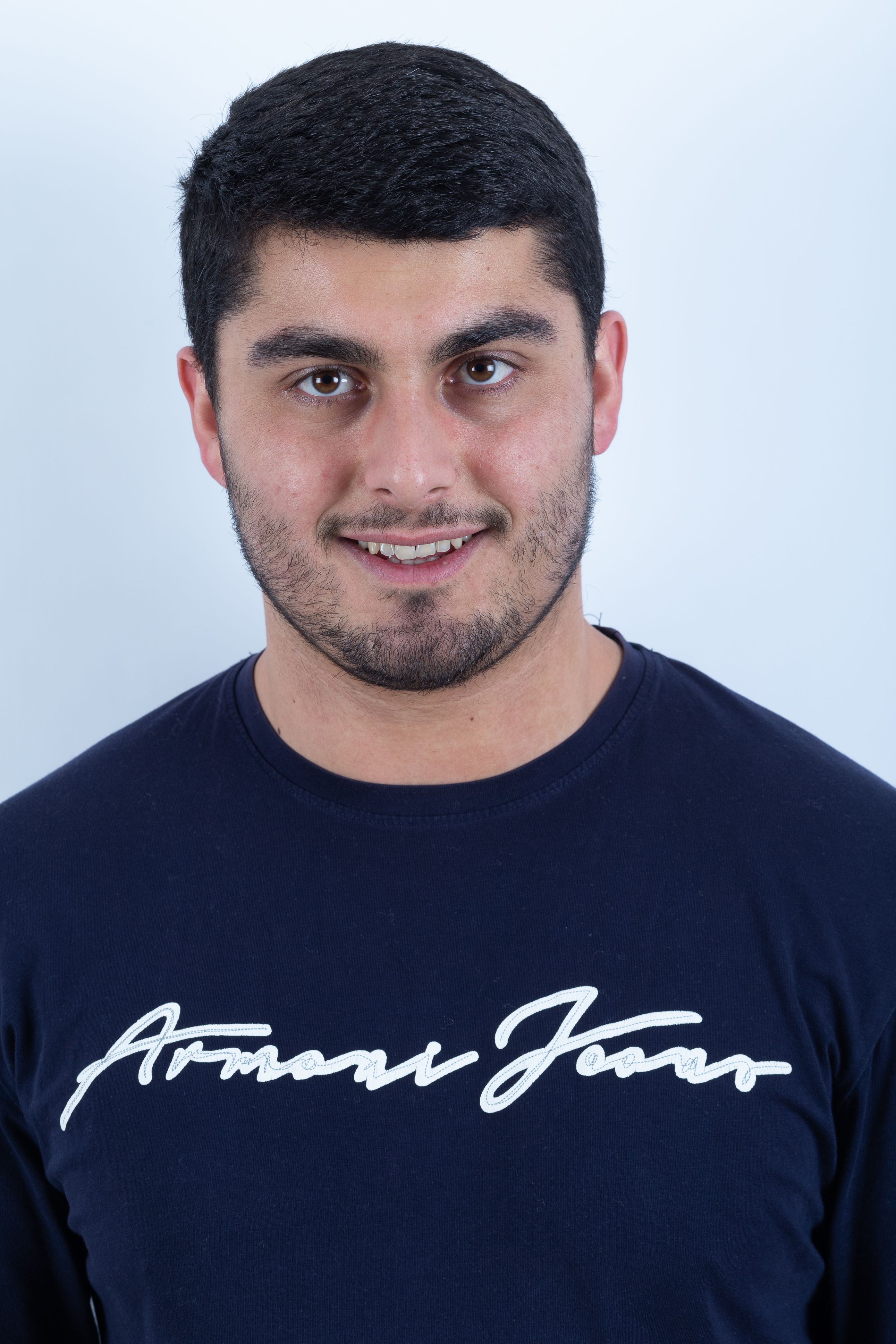 Sogoiani, Giorgi (GEO, Georgien)